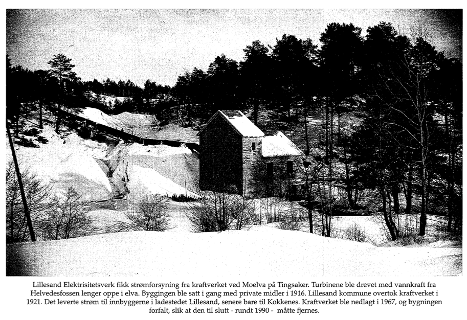 Lillesands første elektrisitetsverk. Bildet er fra nybygging i 1917